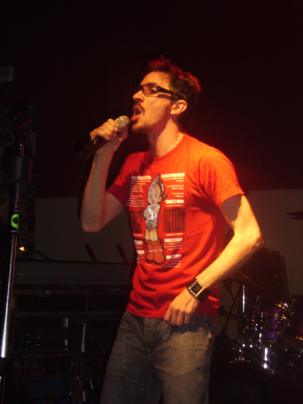 CarlettoFX, cantante del gruppo Gem Boy